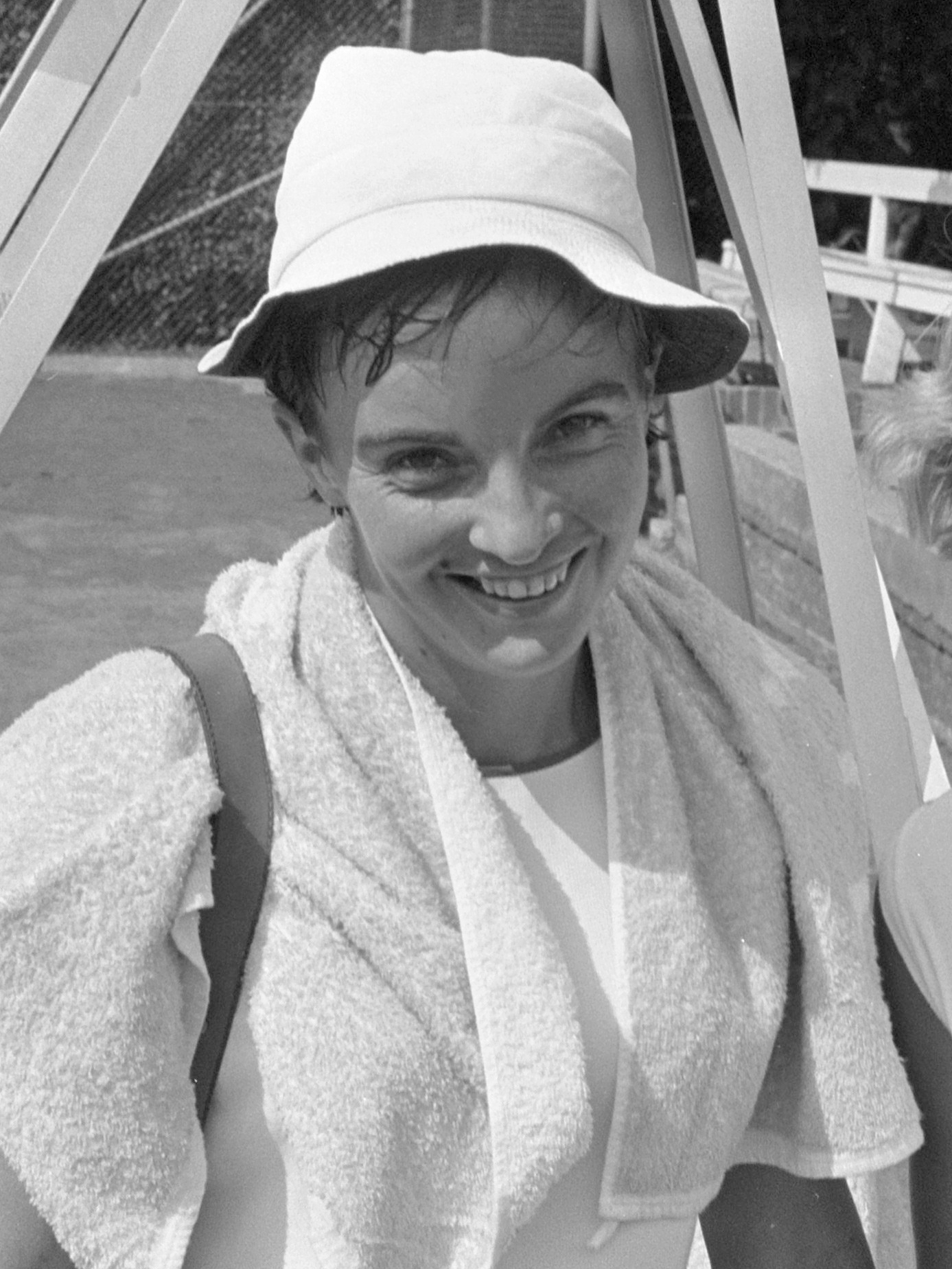 Collectie / Archief : Fotocollectie Anefo Reportage / Serie : [ onbekend ] Beschrijving : Internationale tennistoernooi in Hilversum; Melville Datum : 30 juli 1970 Locatie : Hilversum Trefwoorden : tennis Persoonsnaam : Melville, Schaar, Marijke Fotograaf : Verhoeff, Bert / Anefo Auteursrechthebbende : Nationaal Archief Materiaalsoort : Negatief (zwart/wit) Nummer archiefinventaris : bekijk toegang 2.24.01.05 Bestanddeelnummer : 923-7149